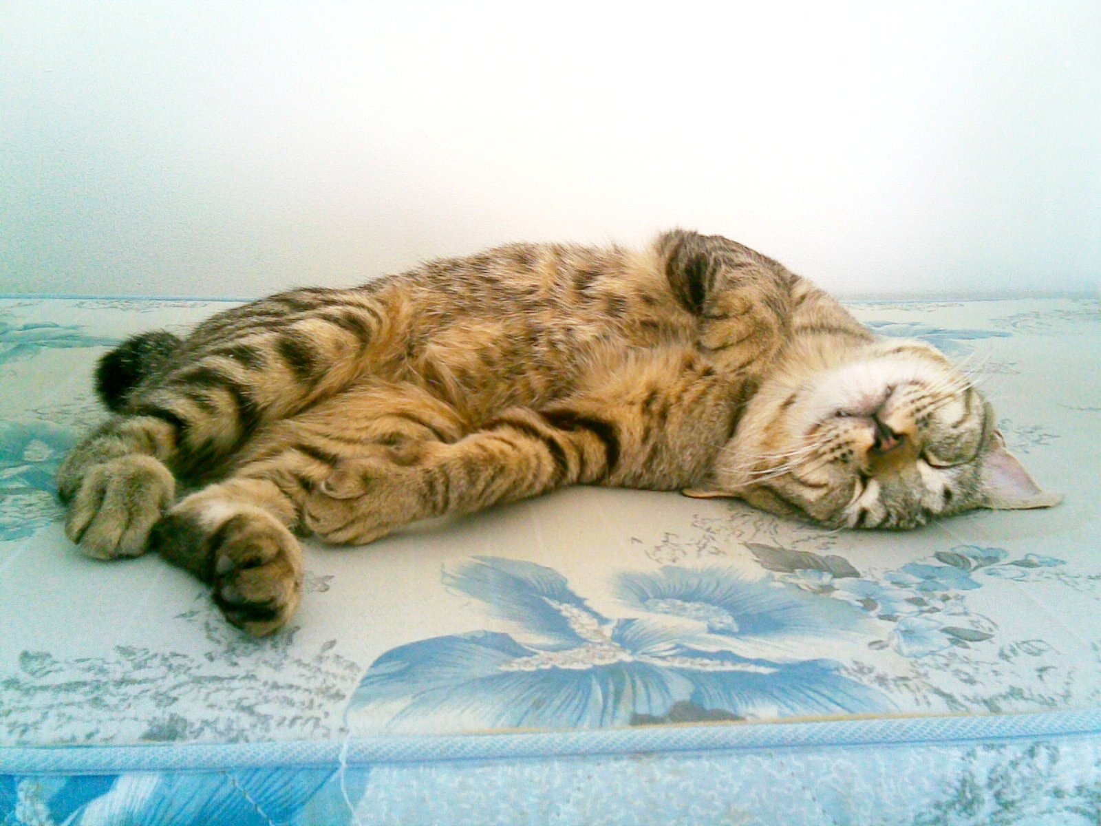 bobtail japones